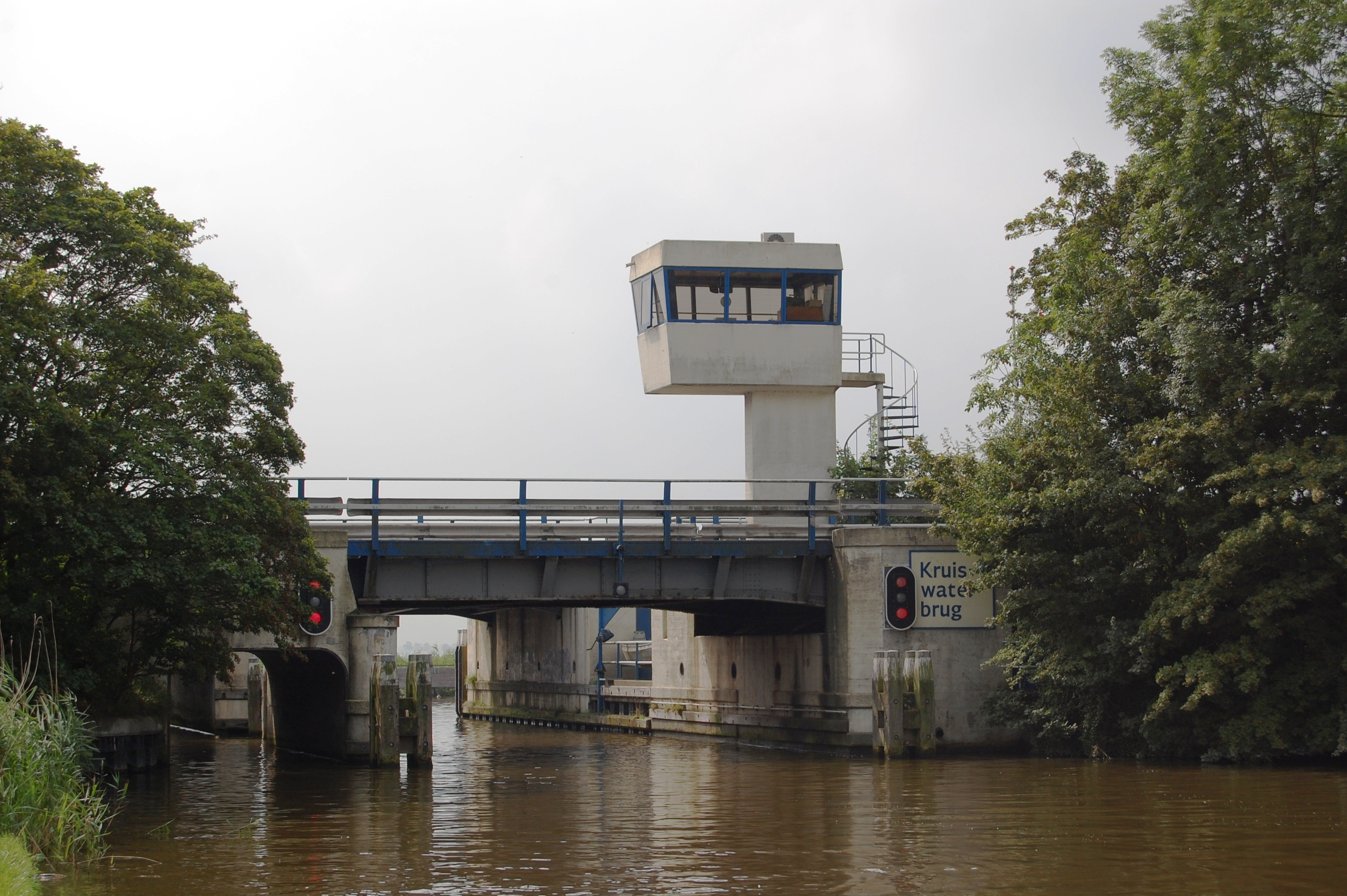 De Kruiswaterbrug in Bolsward die toegang geeft tot de stad